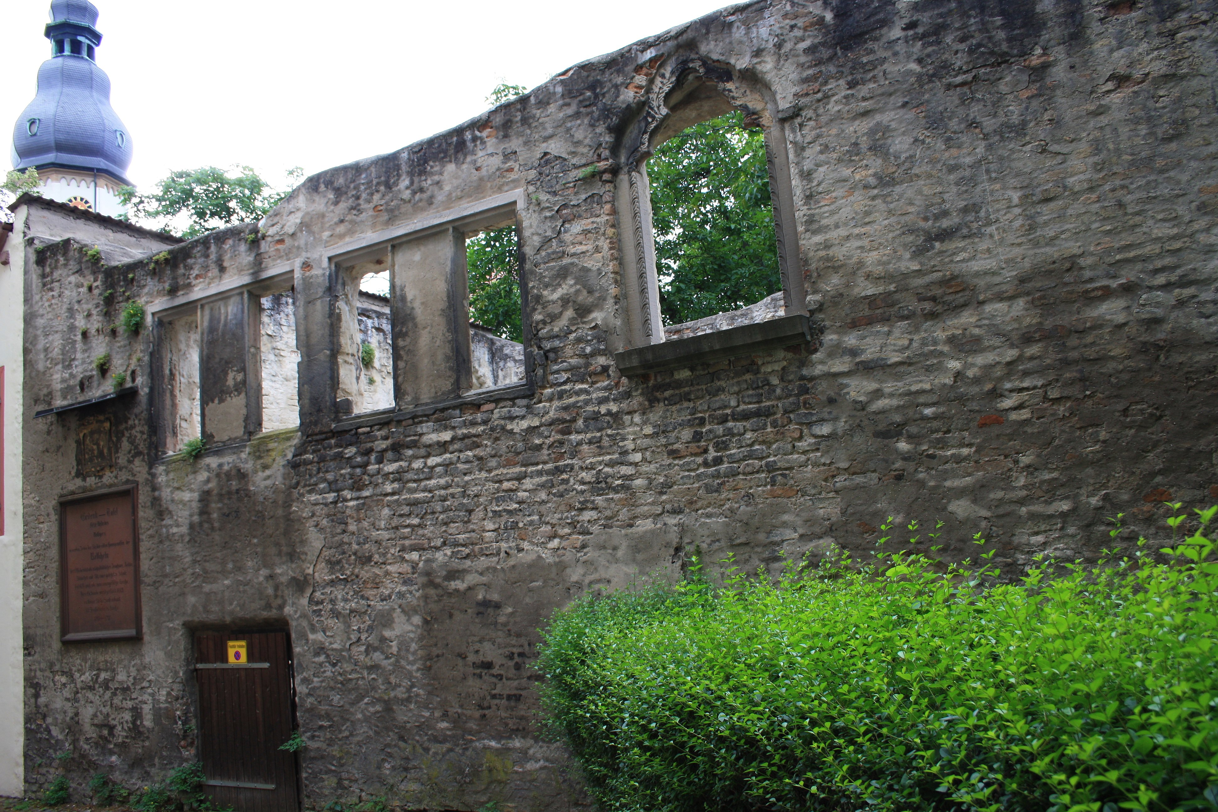 Retscher's